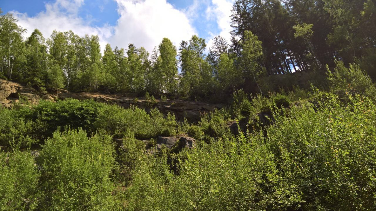 Na fotografii lze vidět kamenné koule, v lokálním nářečí "gule" Megoňky, kamenolom je zarostlý zelení.